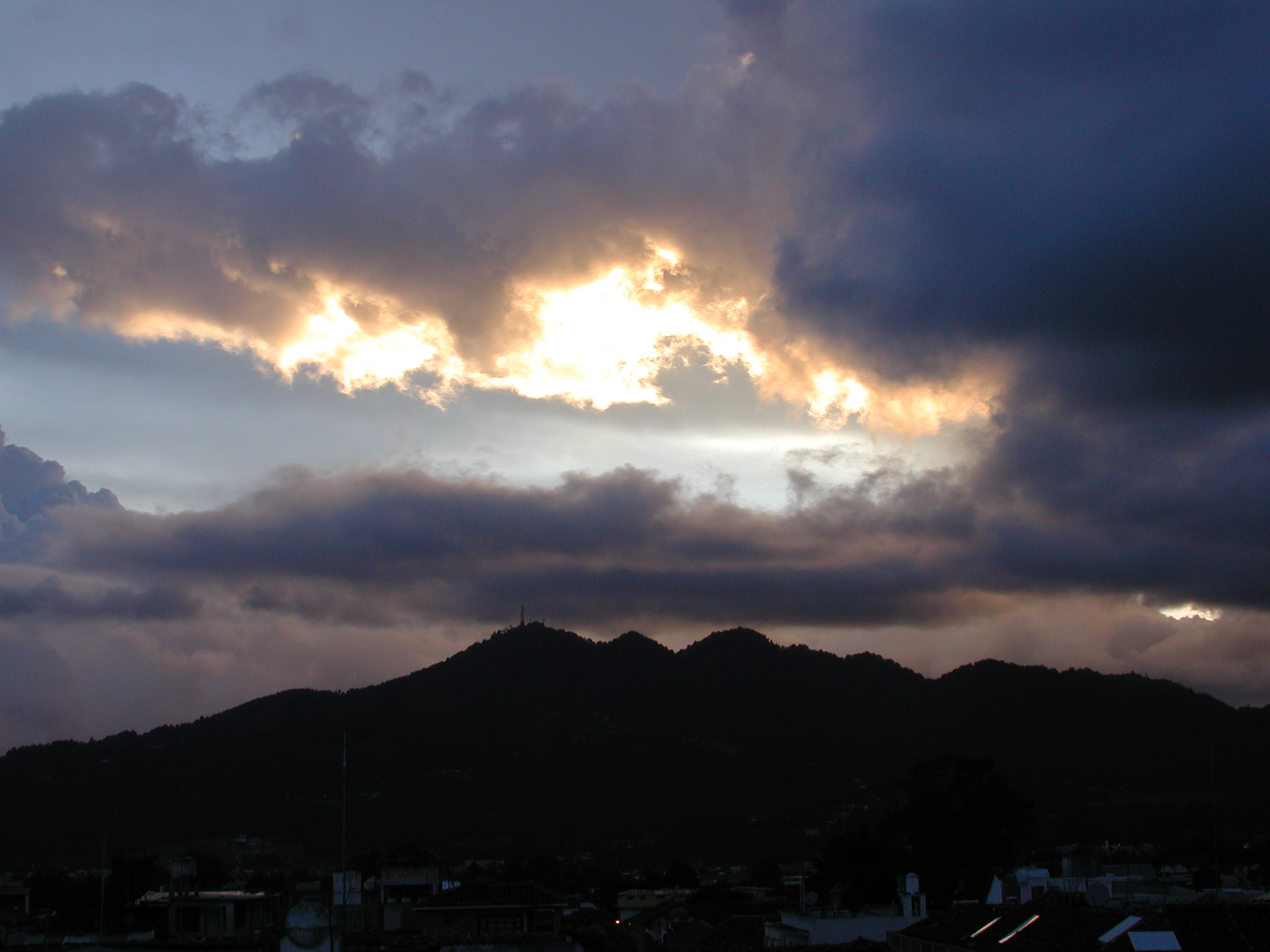 Huitepec at sunset